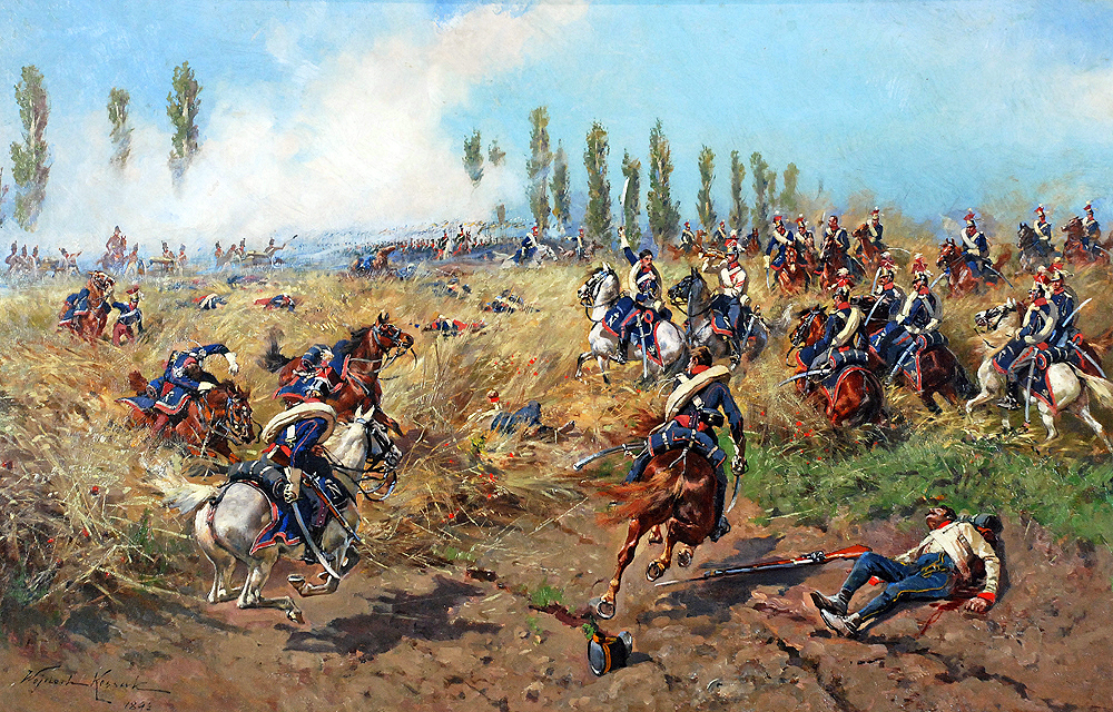 Les chevau-légers polonais de la Garde à Wagram, 1809. Le régiment effectue plusieurs charges contre la cavalerie autrichienne, en particulier les uhlans de Schwarzenberg qui sont mis en déroute.